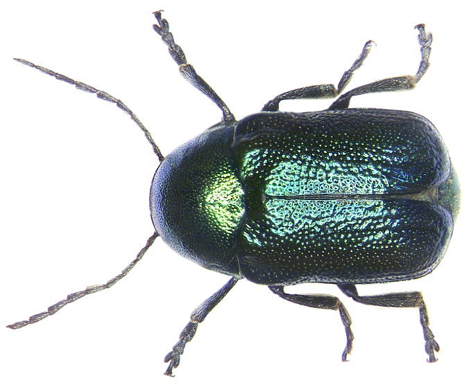 Cryptocephalus hypochaeridis hypochaeridis (Linné, 1758) Familie: Chrysomelidae Grösse: 4,4-5,5 mm Verbreitung: Europa Ökologie: an gelbblühenden Compositen Fundort: Germania, Bayern, Oberfranken, Kulmbach leg. det. U.Schmidt, 1972 Foto: U.Schmidt, 2006